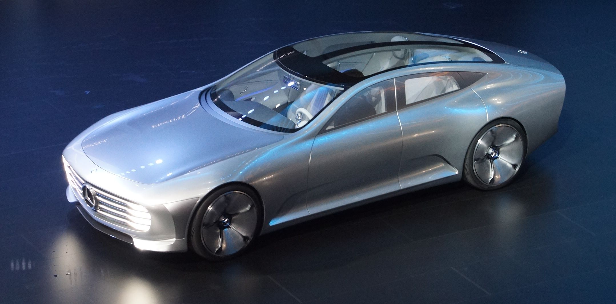 Mercedes-Benz Studie bei der IAA 2015